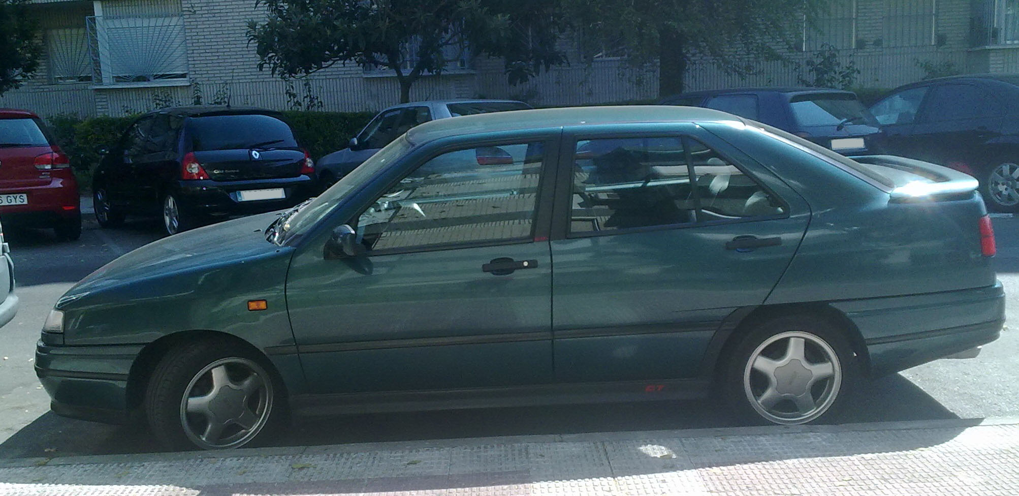 Lateral SEAT Toledo GT verde foto realizada con el movil